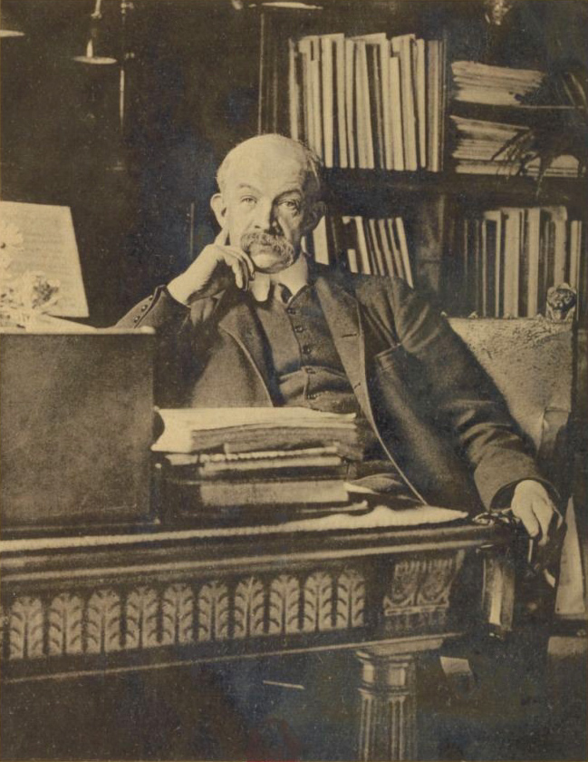 Lucien Herr photographié à sa table de travail par l'archéologue Joseph Chamonard, vers 1914 [1]. Cliché publié dans l'ouvrage de Charles Andler, Vie de Lucien Herr (1864-1926), Paris, Rieder, 1926.